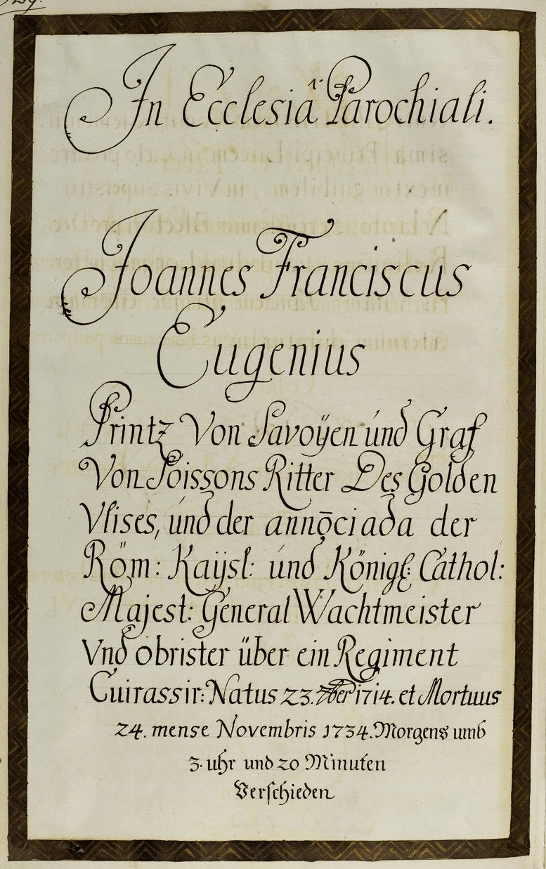 General Johannes Franz Eugen von Savoyen (1714-1734), Grabinschrift in Mannheim, St. Sebastian